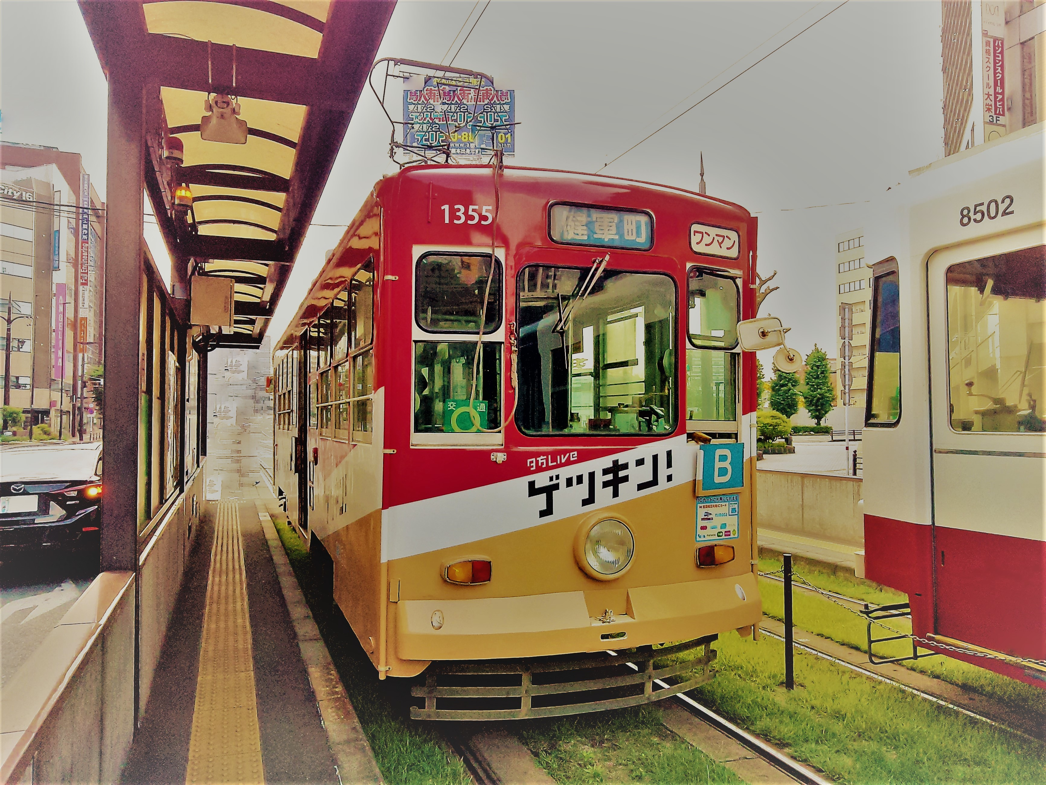 熊本市交通局1350型電車1355号（撮影当時熊本放送のテレビ番組「夕方LIVE ゲツキン!」の広告車）の画像を大幅加工